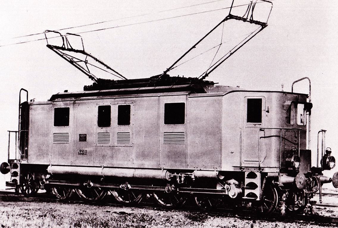 Locomotiva elettrica E.331.1 delle Ferrovie dello Stato.